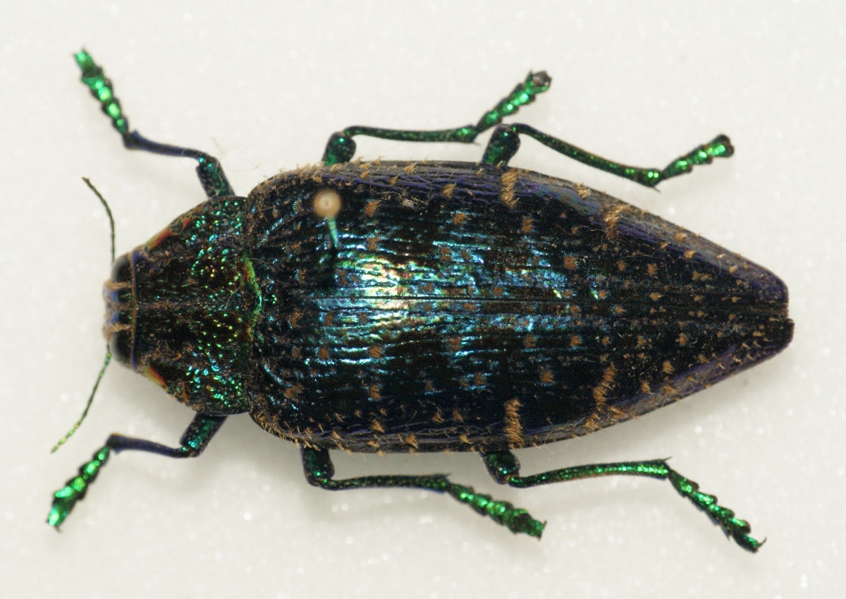 Buprestidae - In collection